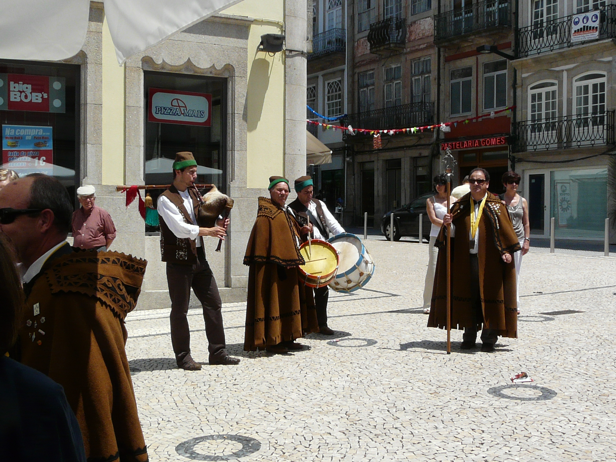 Bagpipe player.